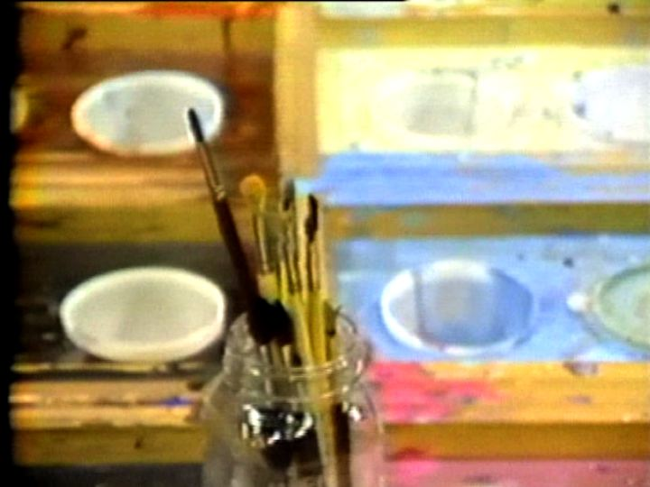 Table-palette. Détails.